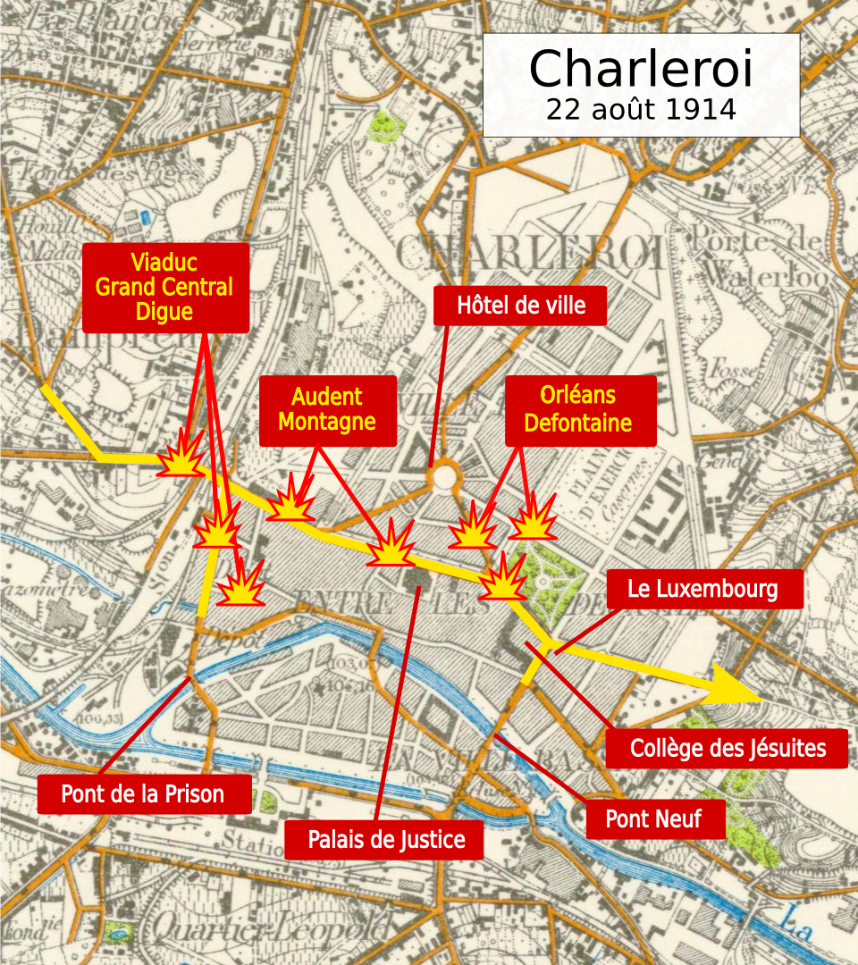 Charleroi - 22 août 1914 - Traité de Couillet - carte imprimée par l'Institut cartographique militaire à Bruxelles en 1939 - levée et nivelée en 1866 - dernière révision en 1905 - compléments en 1939.